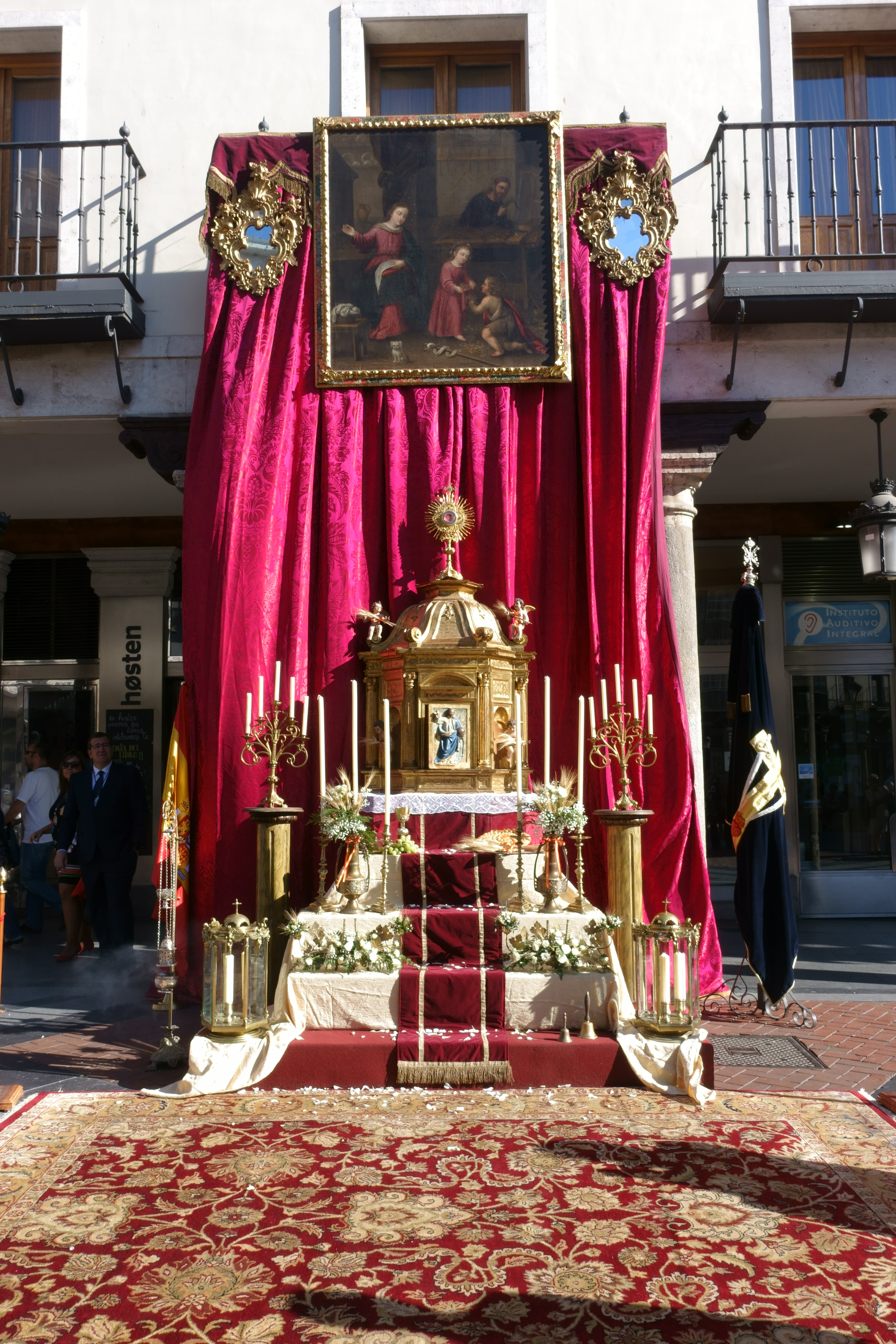 Procesión del Corpus Christi en Valladolid en junio de 2018.